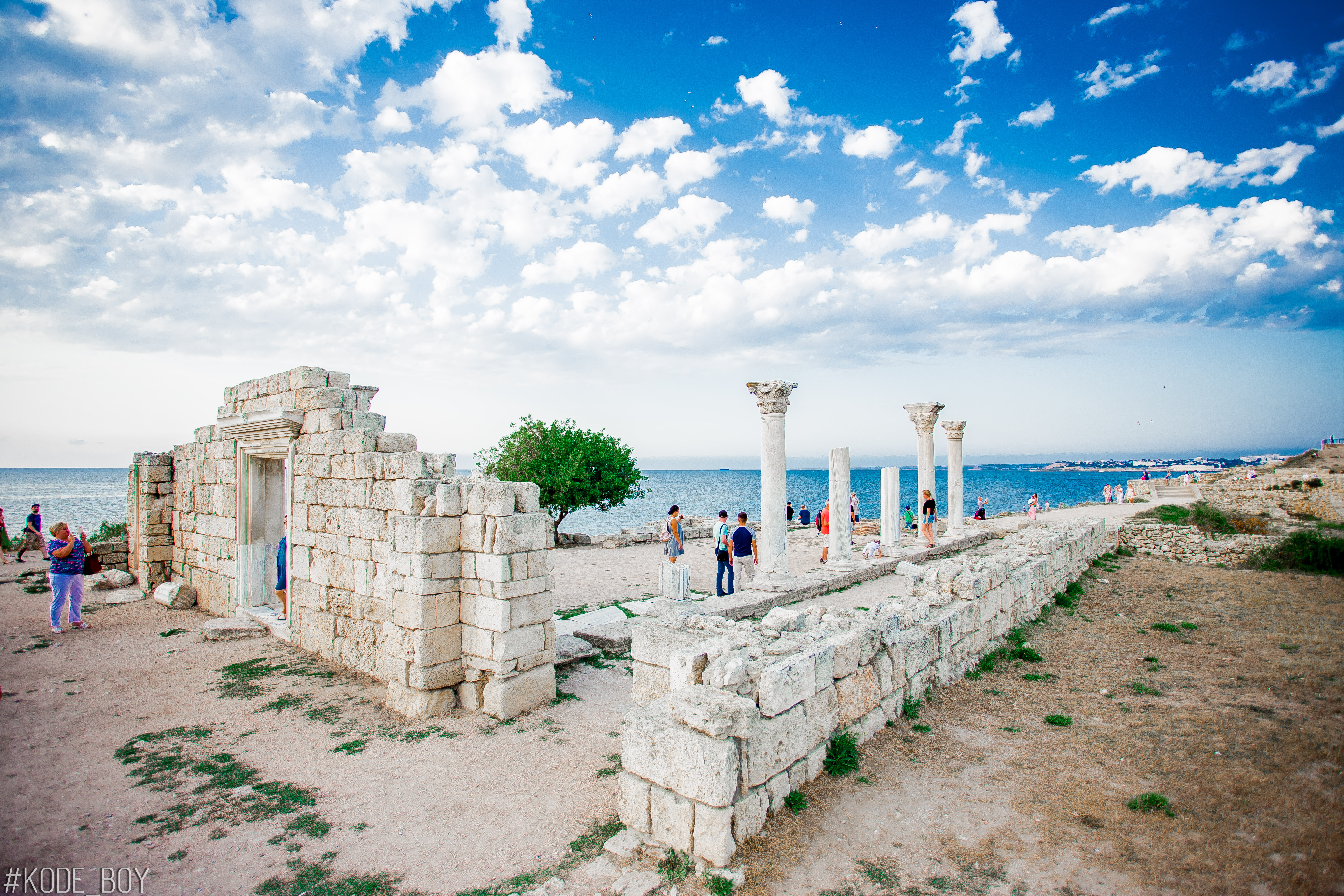 Руины Харсонеса